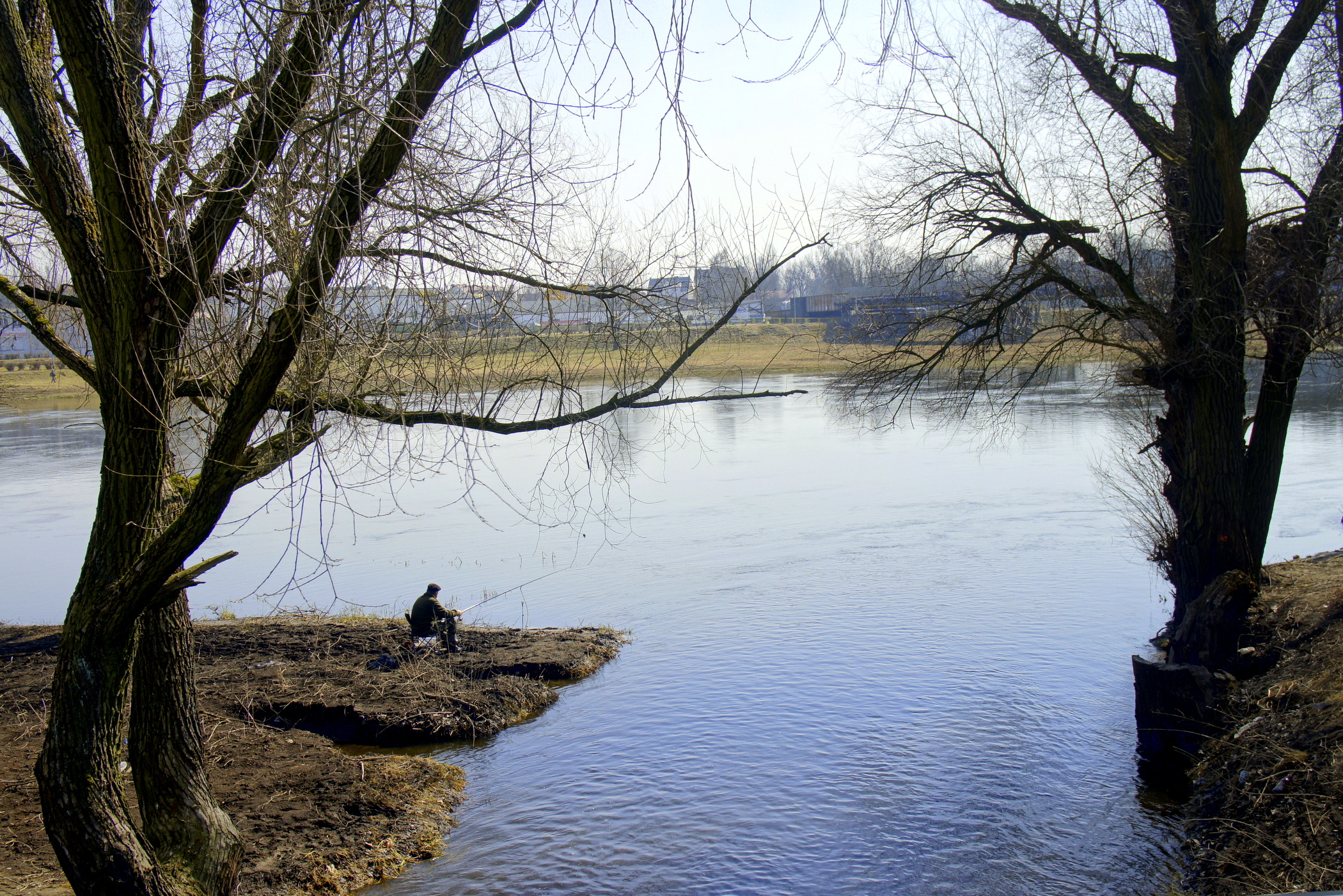 Gorzów Wlkp. Kłodawka wpada do Warty.